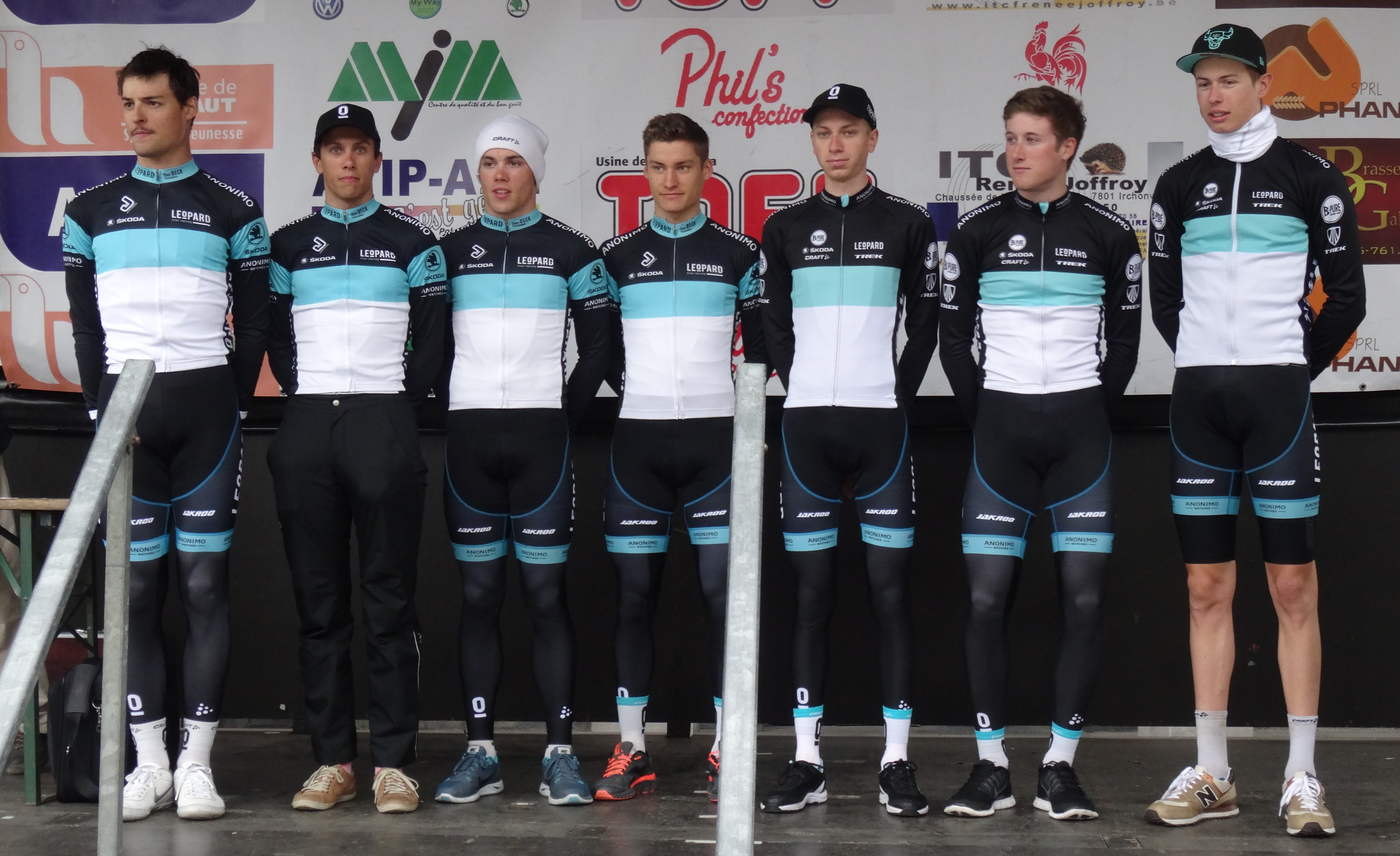 Triptyque des Monts et Châteaux 2014, étape 1, 4 avril 2014, départ d'Antoing. Depicted people: Tom Thill, Dennis Coenen, Kevin Feiereisen, Marco König, Patrick Olesen, Pit Schlechter and Alex Kirsch Depicted team: Leopard Development The creation of these files was made possible thanks to the organizers of the Triptyque des Monts et Châteaux 2014 English | français | +/−